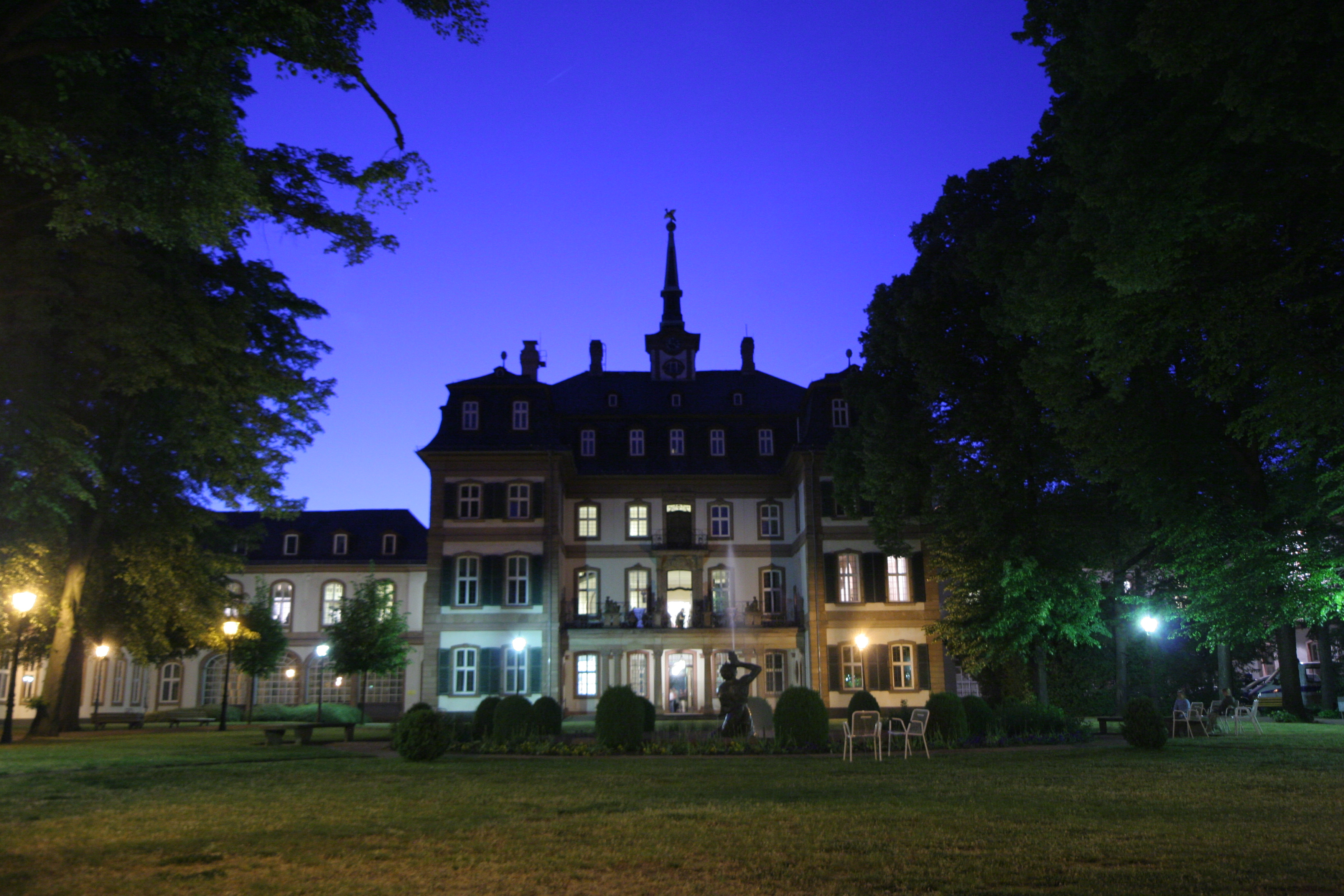 Bolongaropalast, Höchst, at night